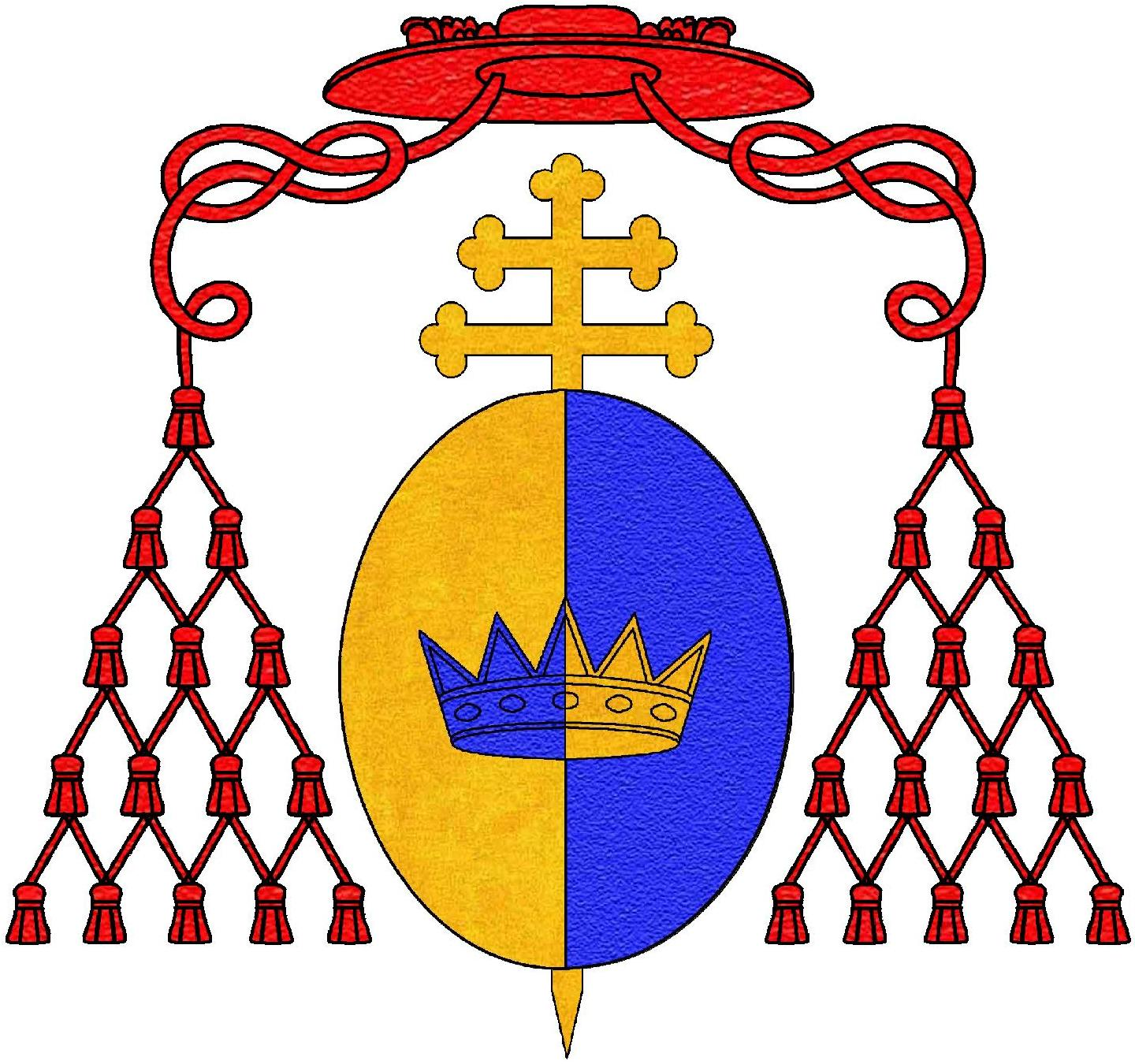 Stemma del cardinale Francesco Corner Stemma del cardinale Andrea Corner